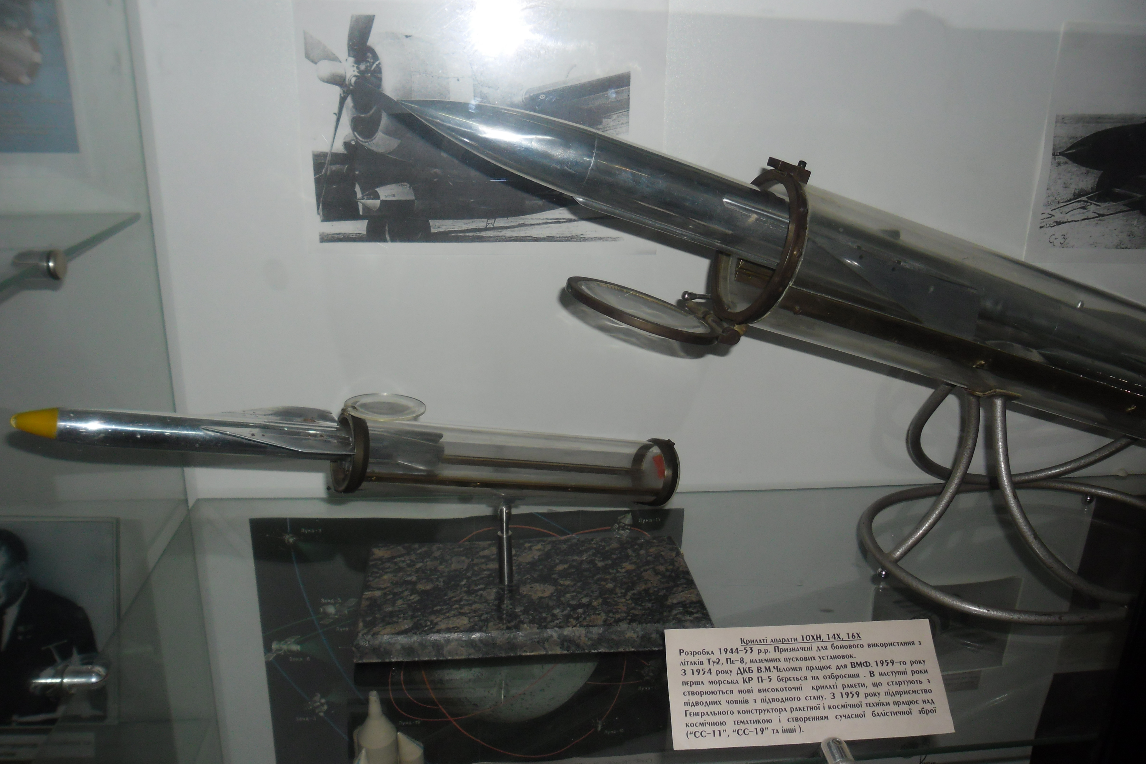 Крилаті апарати 10ХН